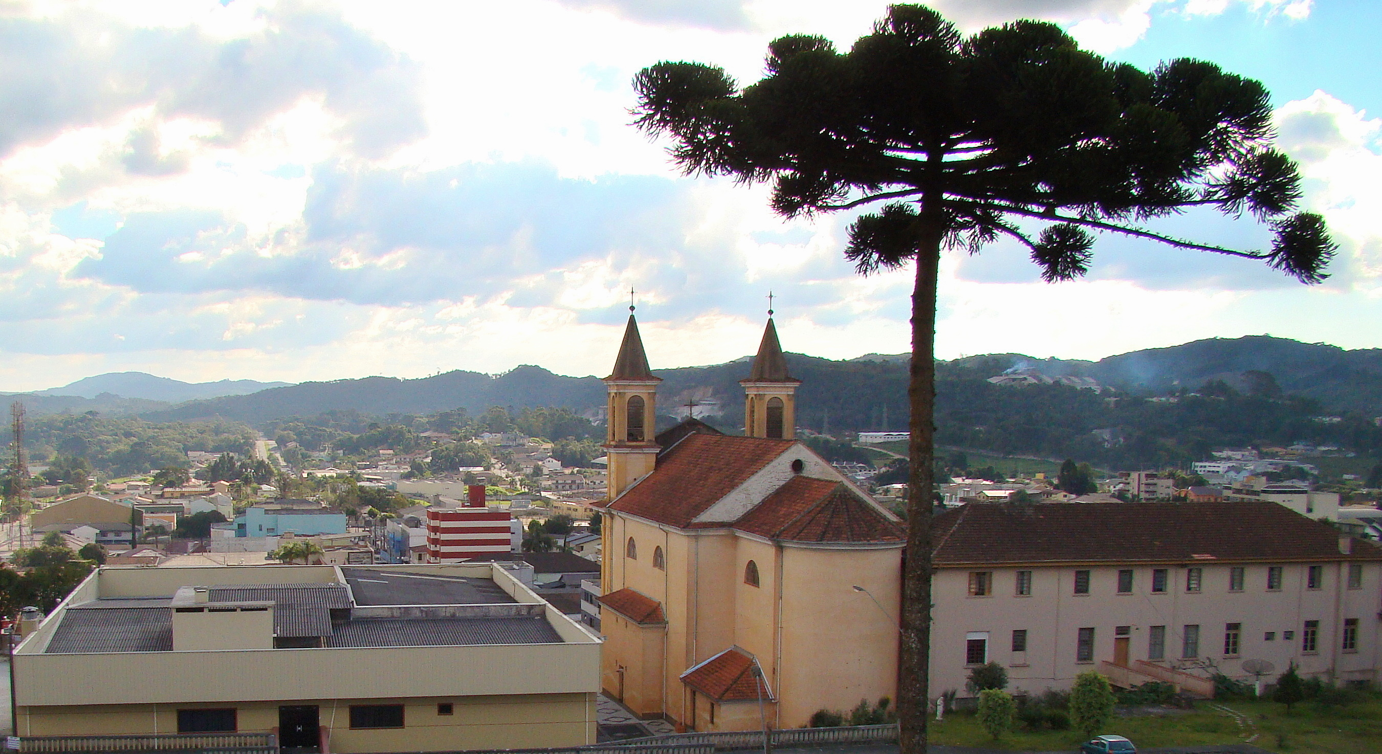 Vista parcial do centro de Colombo (município da Grande Curitiba, Estado do Paraná, Sul do Brasil) a partir do cemitério da Igreja Matriz Nossa Senhora do Rosário.